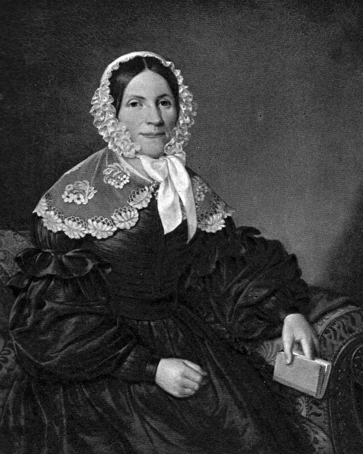 Porträtgemälde von Julie Zanders